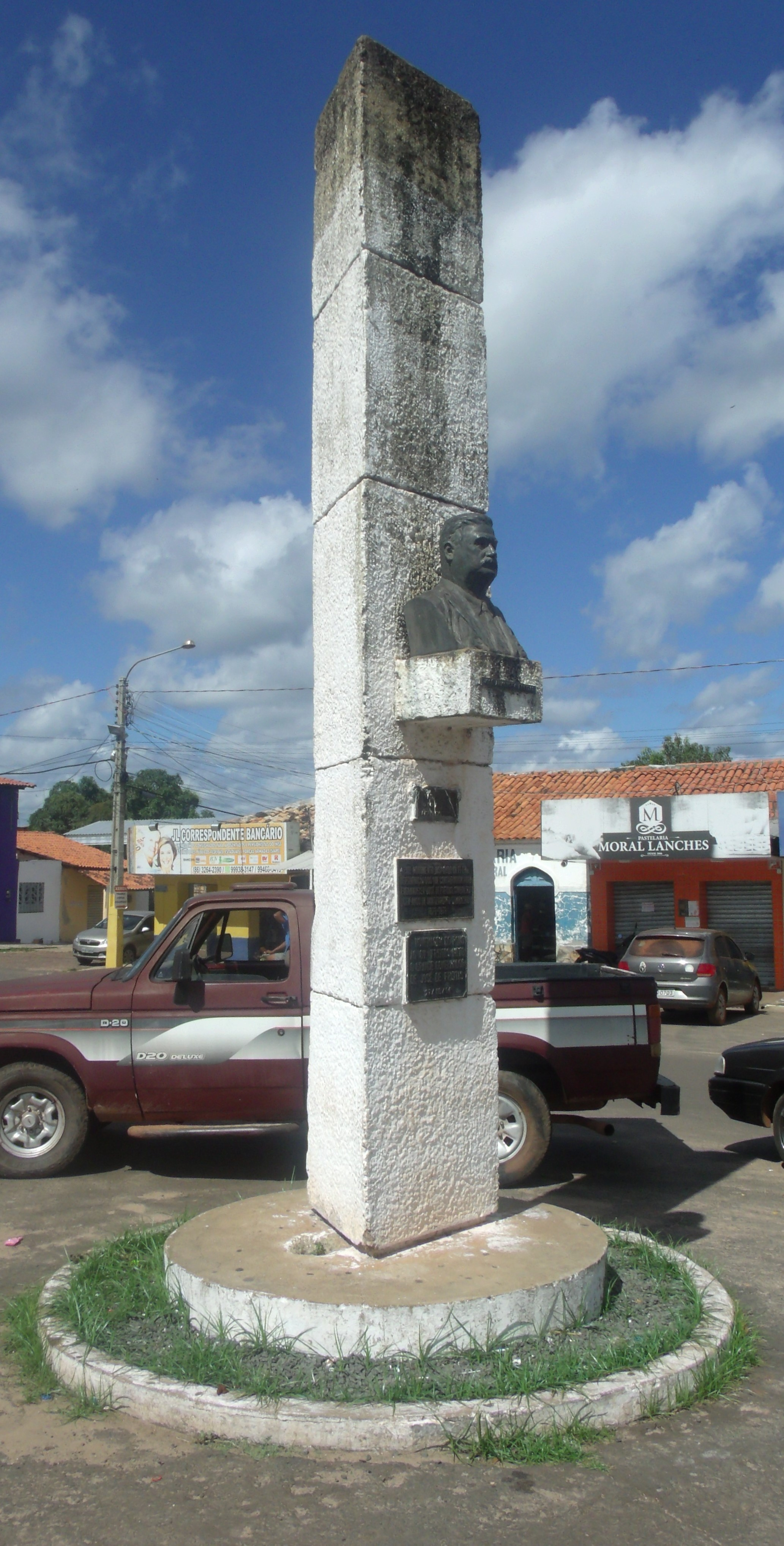 Monumento com o busto do José de Freitas na cidade que tem o nome dele. Fica na Praça Pedro Freitas.